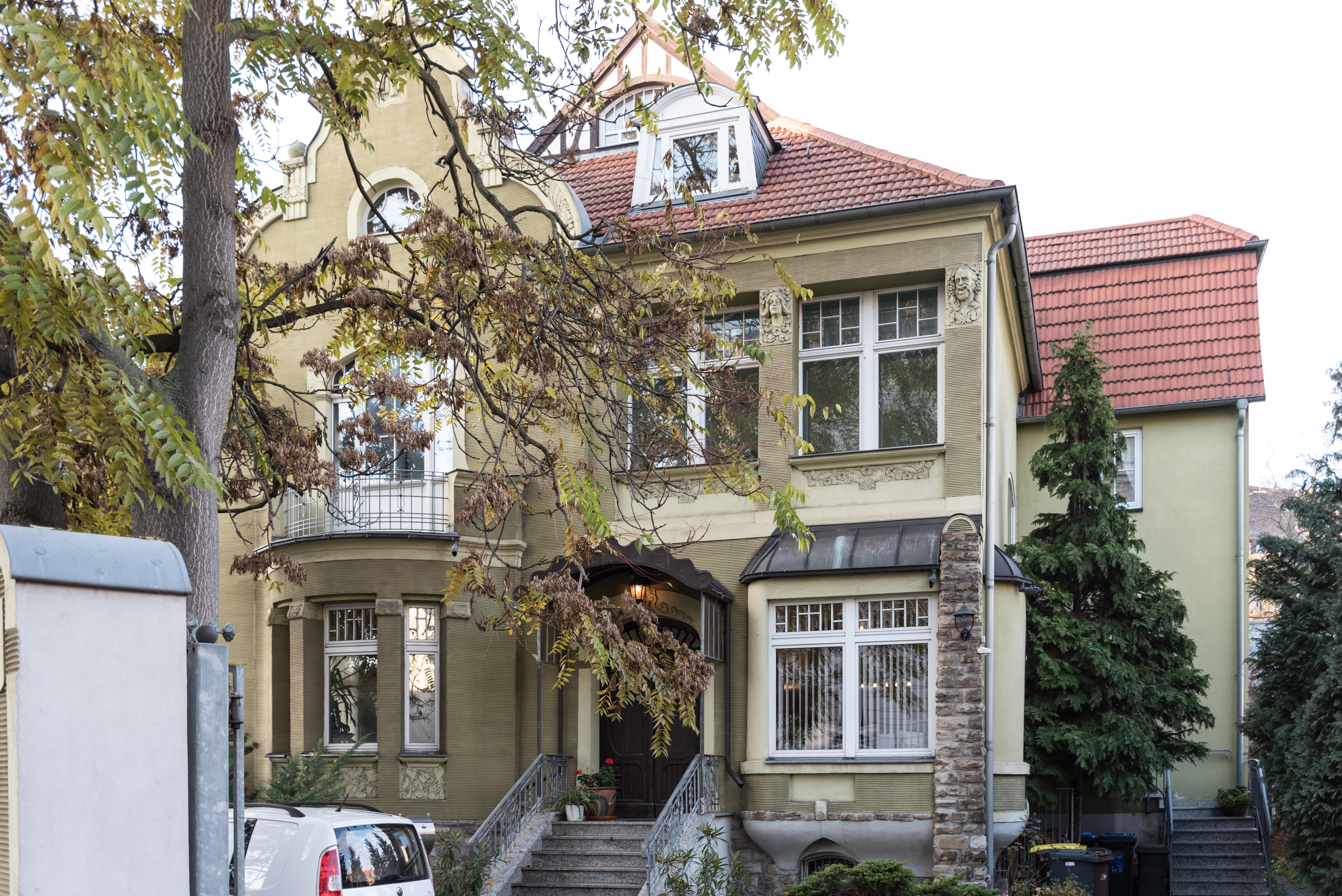 Weißenfels, Friedrichstraße 12